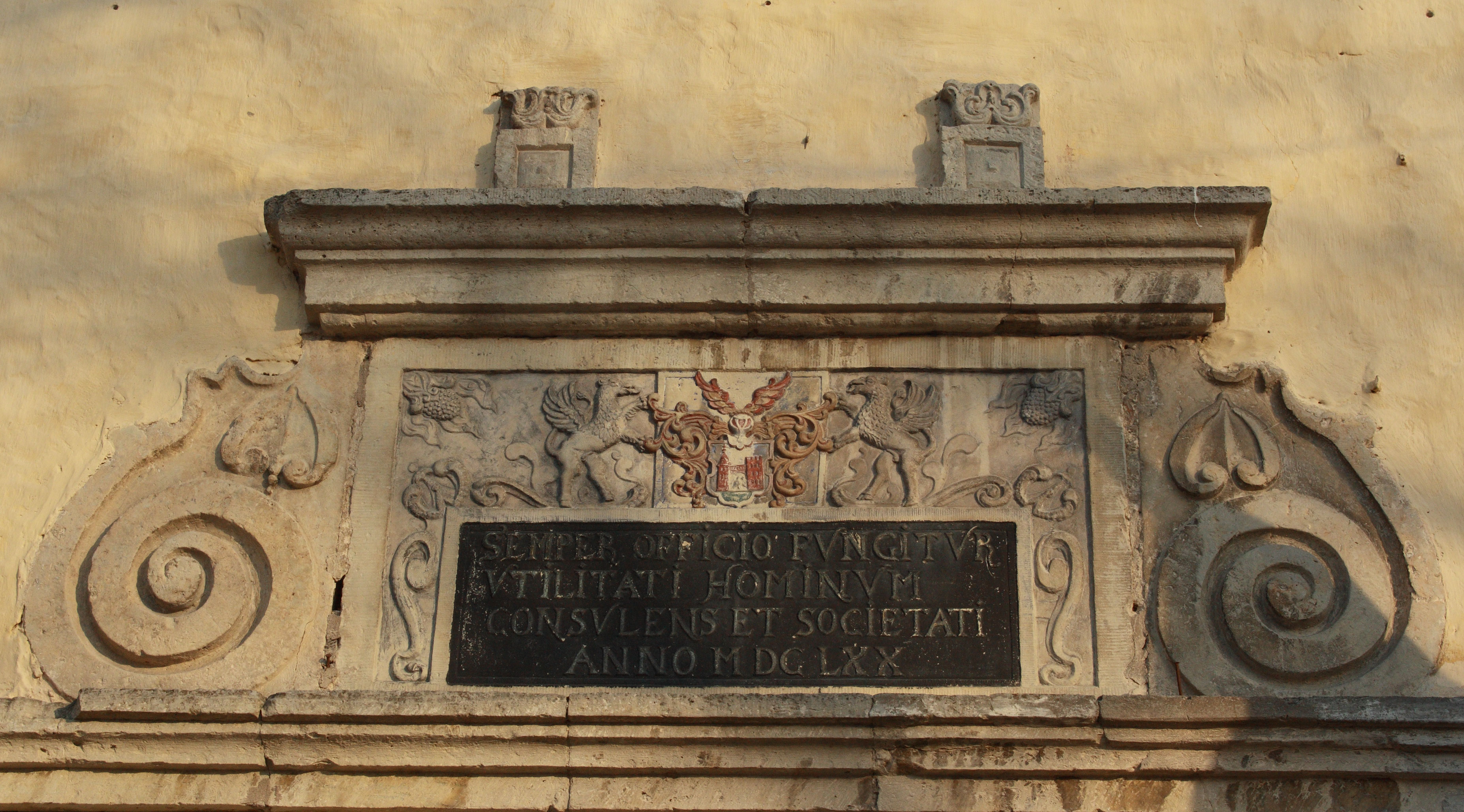 Kuressaare raekoja ehisvorm. SEMPER OFFICIO FUNGITUR UTILITATI HOMINUM CONSULENS ET SOCIETATI ANNO M DC LXX